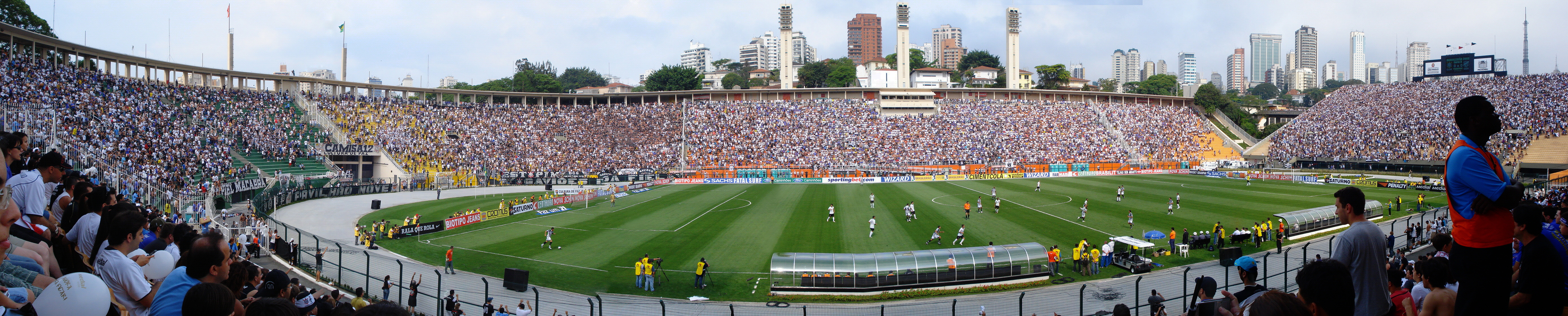 Pra onde nunca deveria ter saído, a 1ª divisão! Pra descrever isso melhor do q a música do roberto carlos tocada no Pacaembu, meu pai sugeriu essa canção tipicamente paulista: "Se vocêis pensa que nóis fumos embora nóis enganemos vocêis fingimos que fumos e vortemos oi nóis aqui traveis" Geraldo Blota/Joseval Peixoto Best viewed large